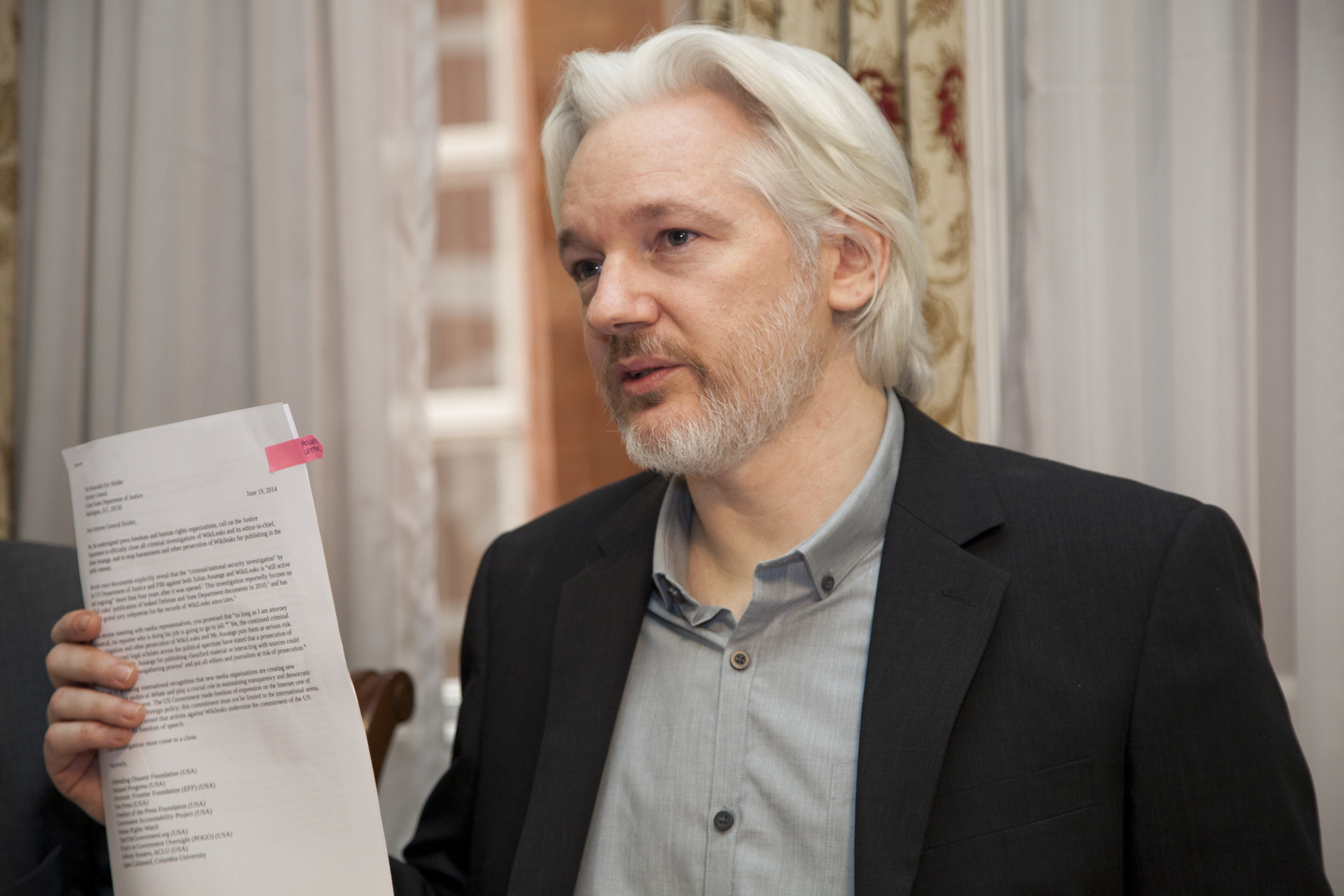 Londres (Reino Unido), 18 de Agosto 2014, Canciller Ricardo Patiño y Julian Assange ofrecieron una rueda de prensa con presencia de medios internacionales. Foto: David G Silvers. Cancillería del Ecuador.